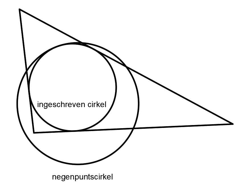 Illustratie van de Stelling van Feuerbach, dat de negenpuntscirkel raakt aan de ingeschreven cirkel. (eigen illustratie)